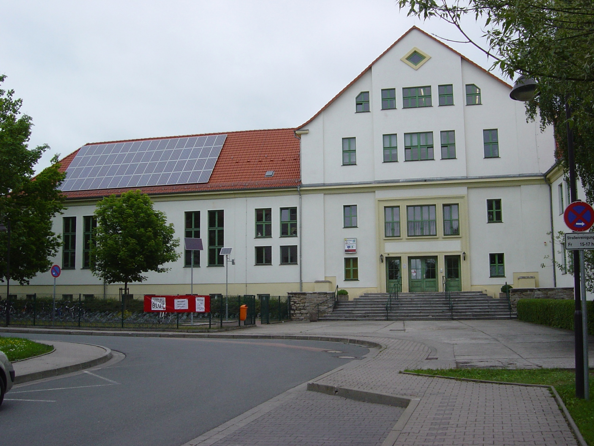 Kooperativen Gesamtschule Benndorf, Adolf-Diesterweg-Straße 2, 06308 Benndorf